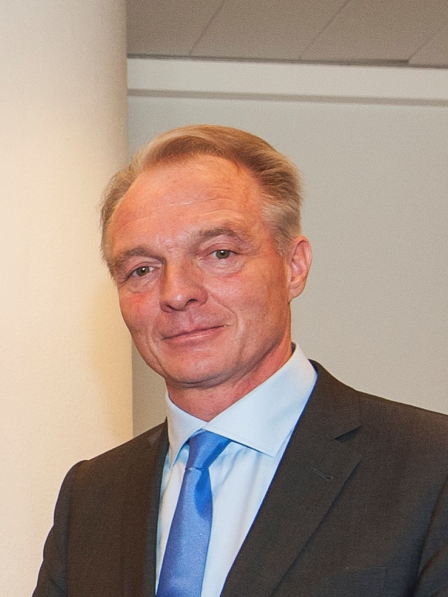 Overhandiging Manifest 'Recht op Mediawijsheid' aan Kinderombudsman Marc Dullaert